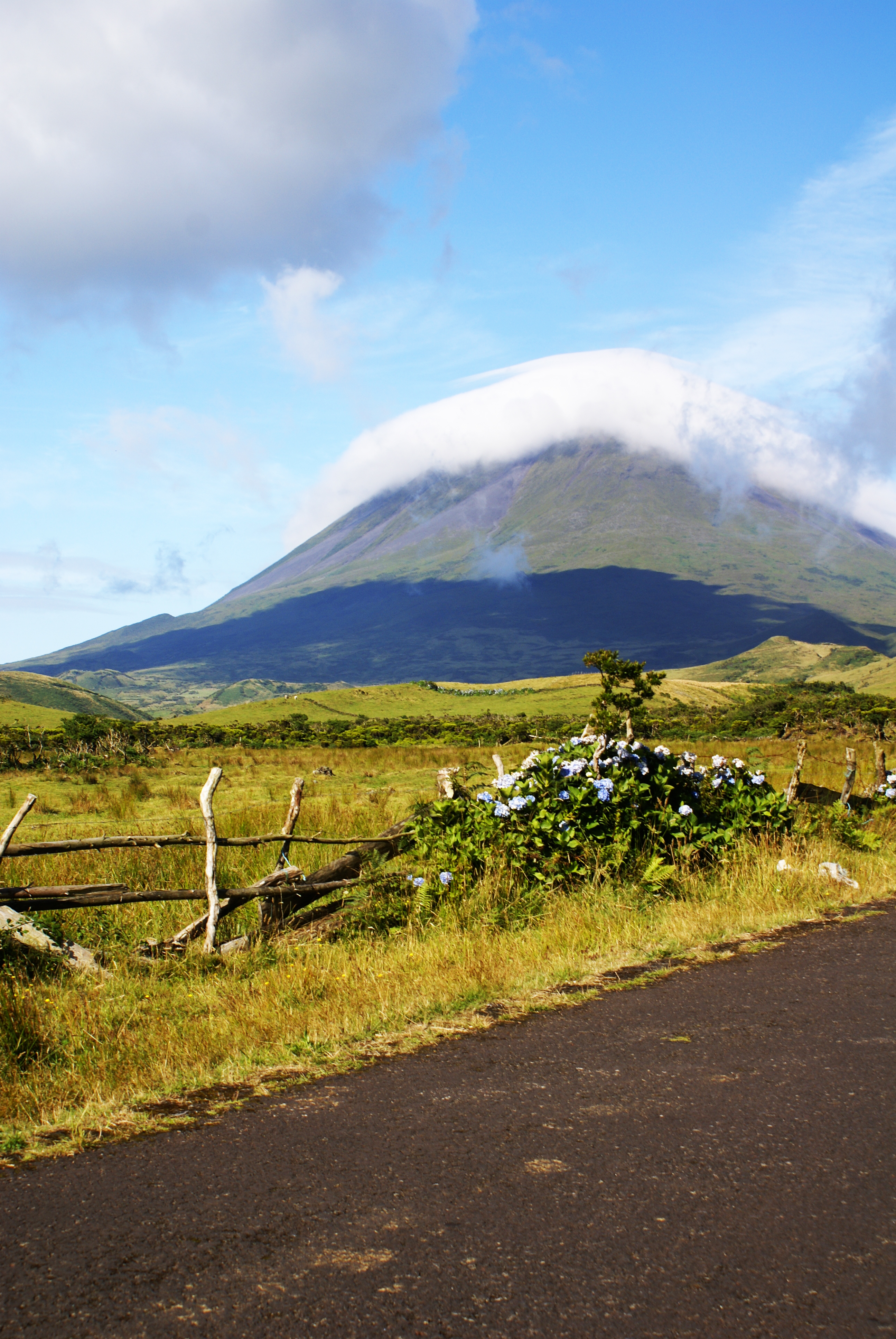 Montanha do Pico, aspectos 4 ilha do Pico, Açores, Portugal